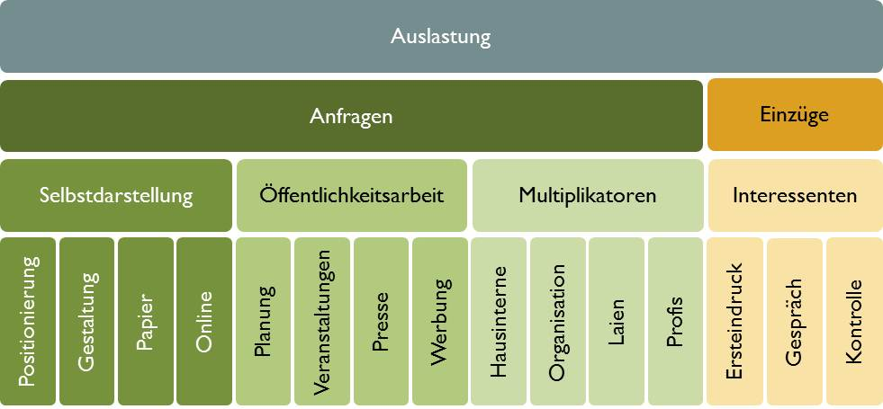 Definition der Breiche des Belegungsmanagement nach olav sehlbach beratung